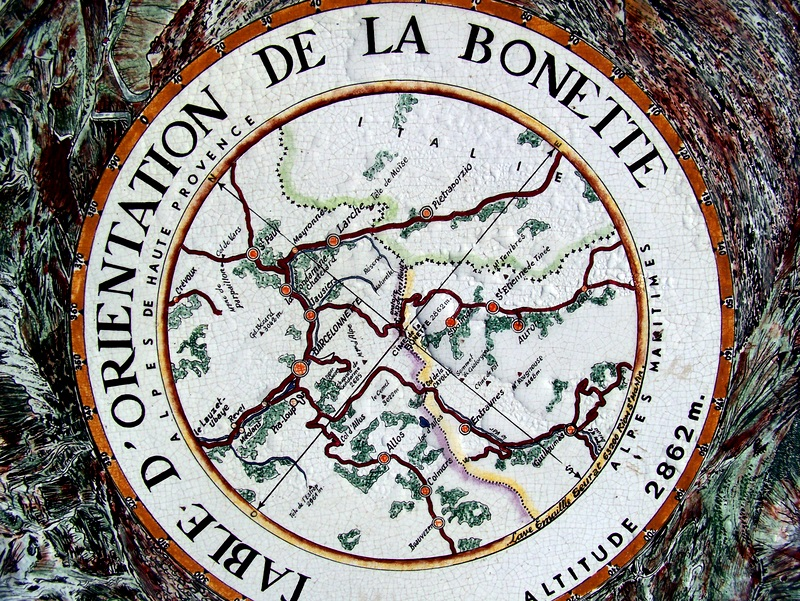 Tables d'orientation de la cime de la Bonette: Plan des environs de la bonette